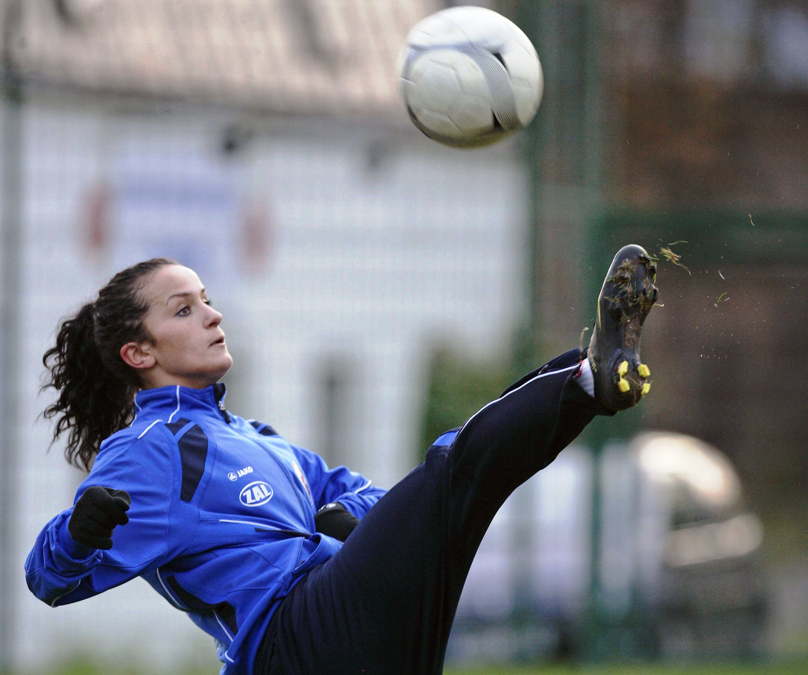 Die Hauptgefreite Lira Bajramaj, Fußballerin bei Turbine Potsdam und Nationalspielerin während des Trainings. ©Bundeswehr/Bienert